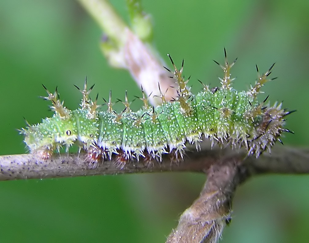 Południca osetnik (Rusałka osetnik), Brok, Poland